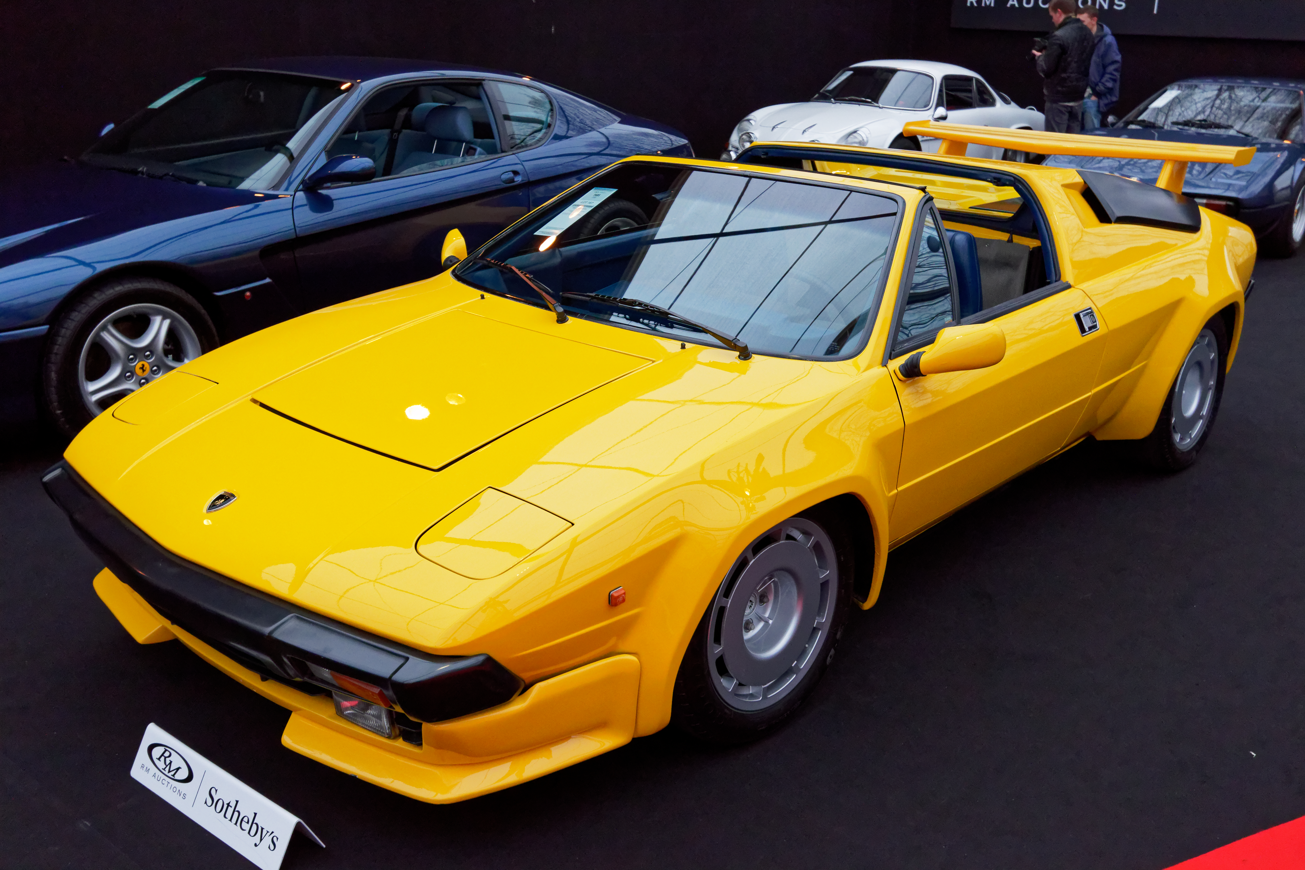 Un véhicule exposé lors de la vente RM Sotheby’s 2018 aux Invalides à Paris.